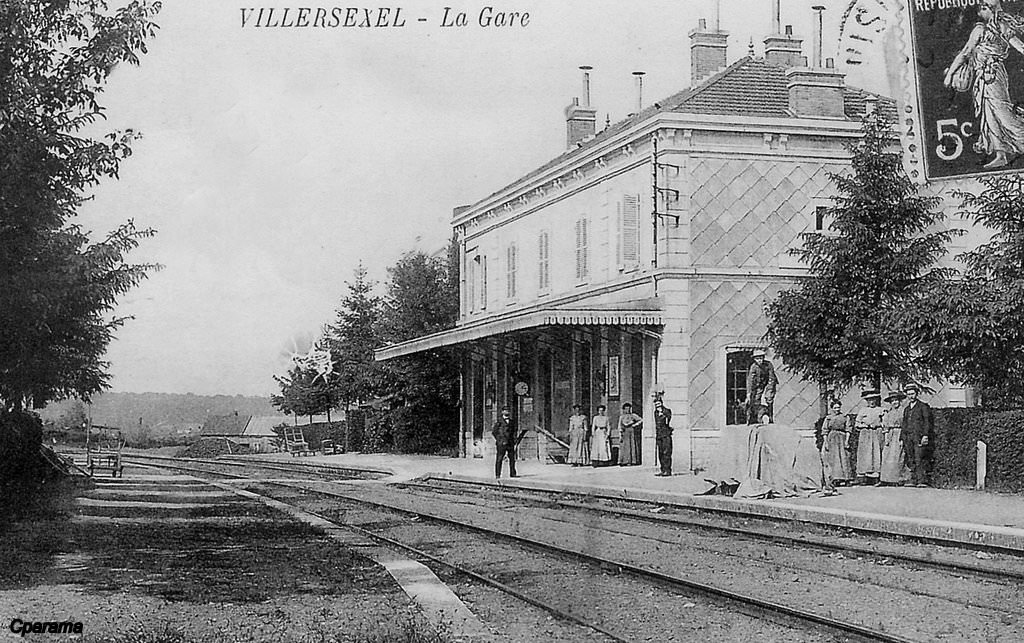 La gare de Villersxel en fonctionnement.